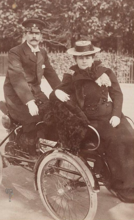 Pierre Lafitte et son épouse, sur un véhicule à moteur. Photographie de Jules Beau, photographe sportif français, album n° 07 (1898-1899).